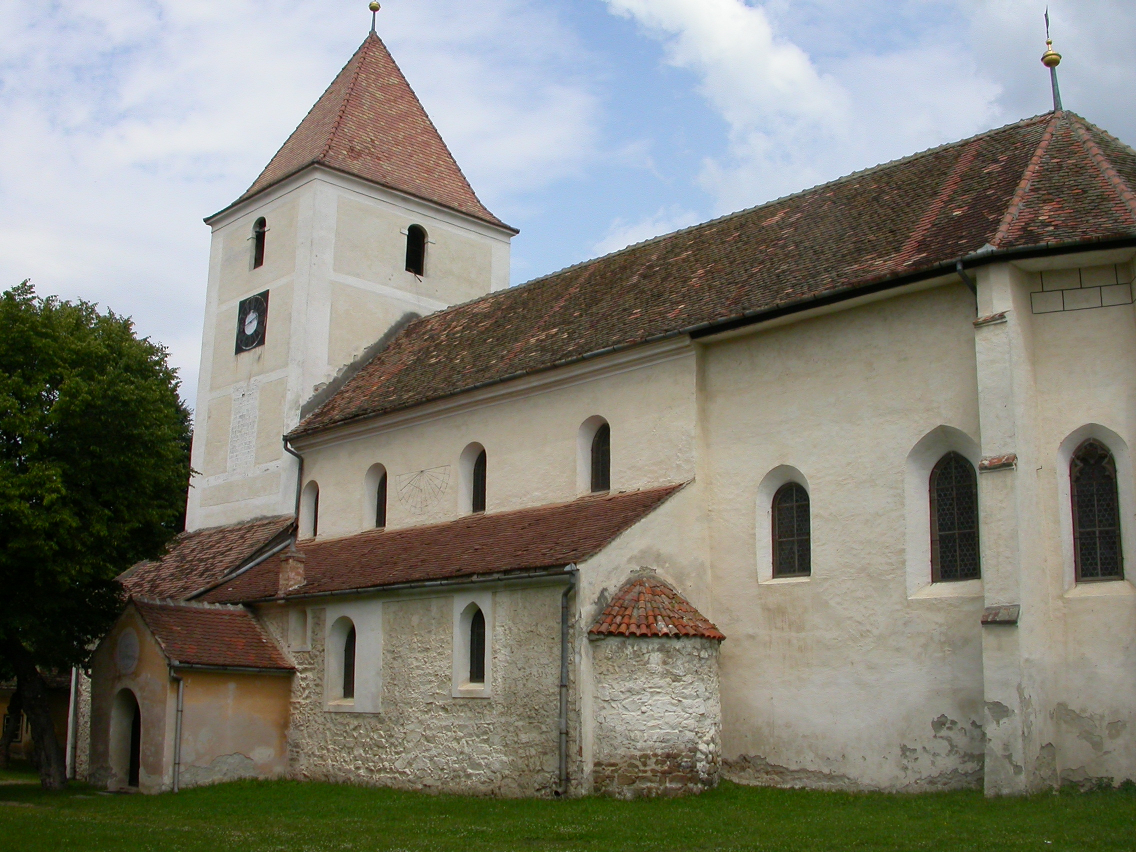 Ansamblul bisericii evanghelice fortificate Gușterița, înc. sec. XIII - sec. XVIII